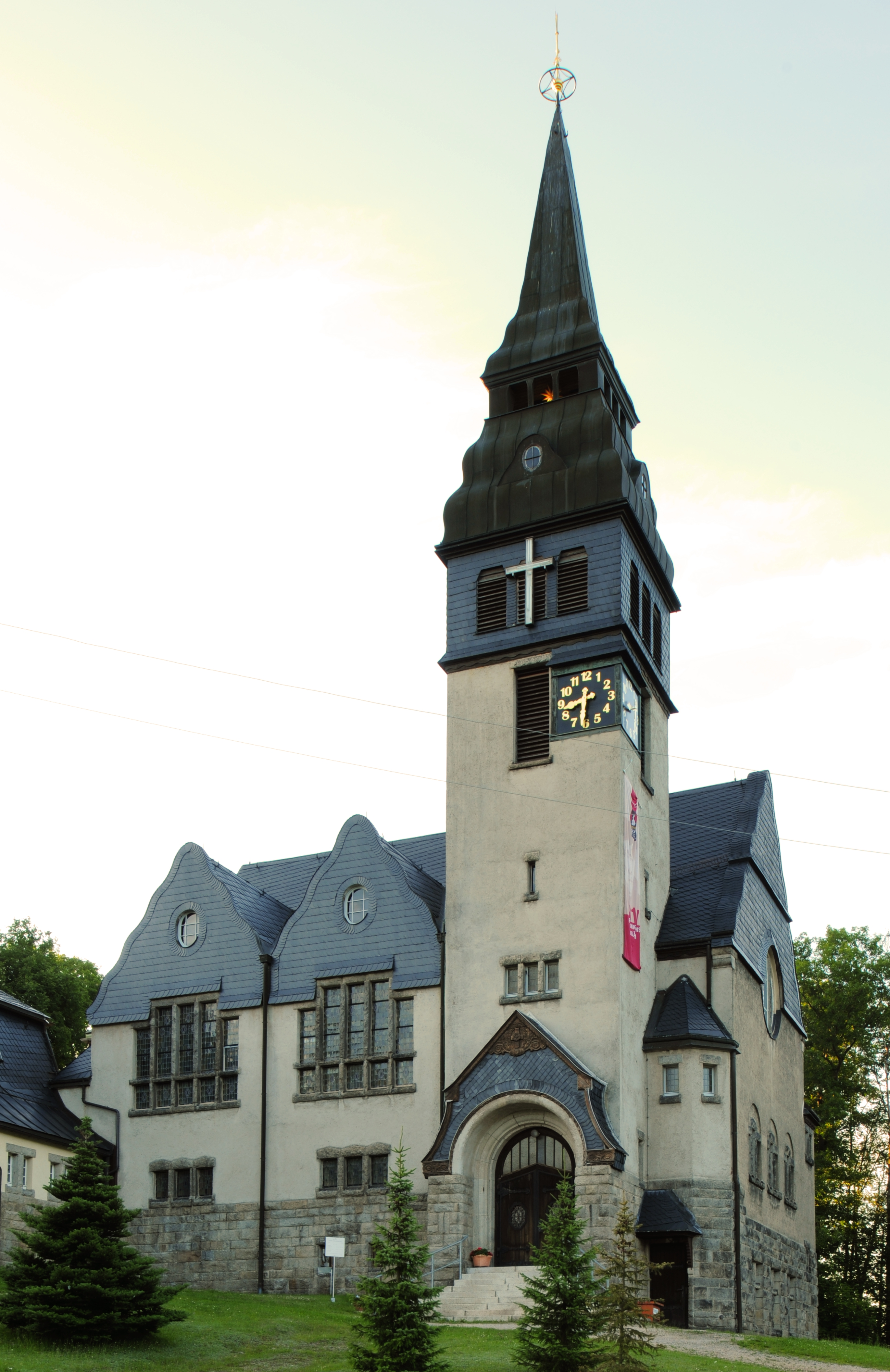 Tannenbergsthal, evangelisch-lutherische Martin-Luther-Kirche (Gemeinde Muldenhammer, Vogtlandkreis, Sachsen, Deutschland)